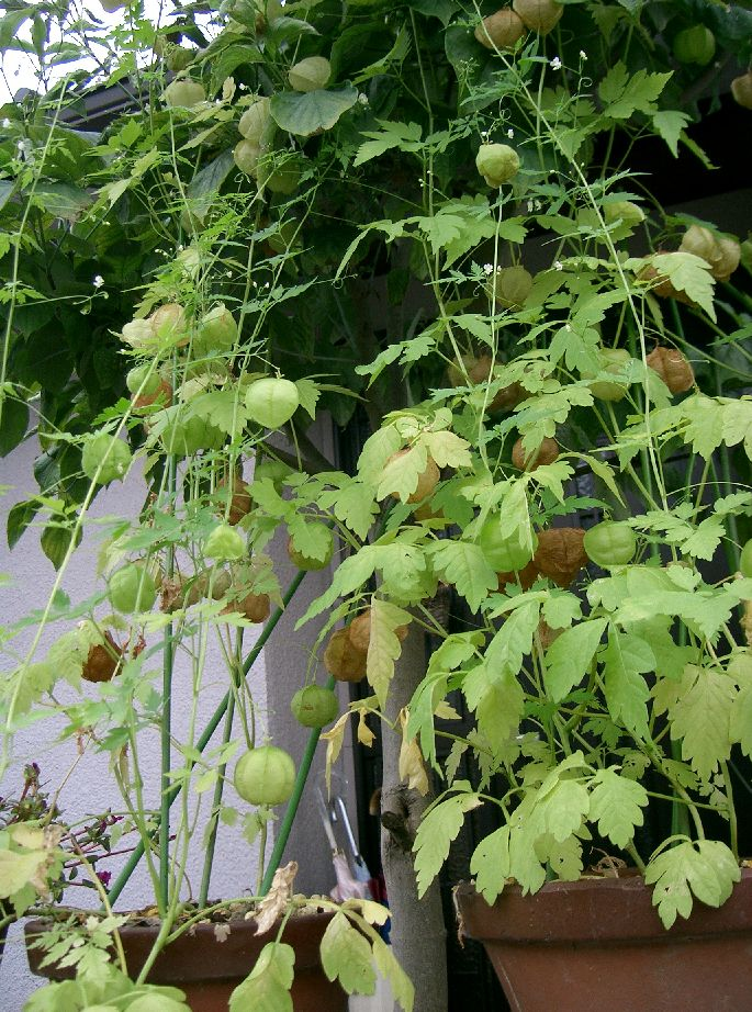 Cardiospermum halicacabum